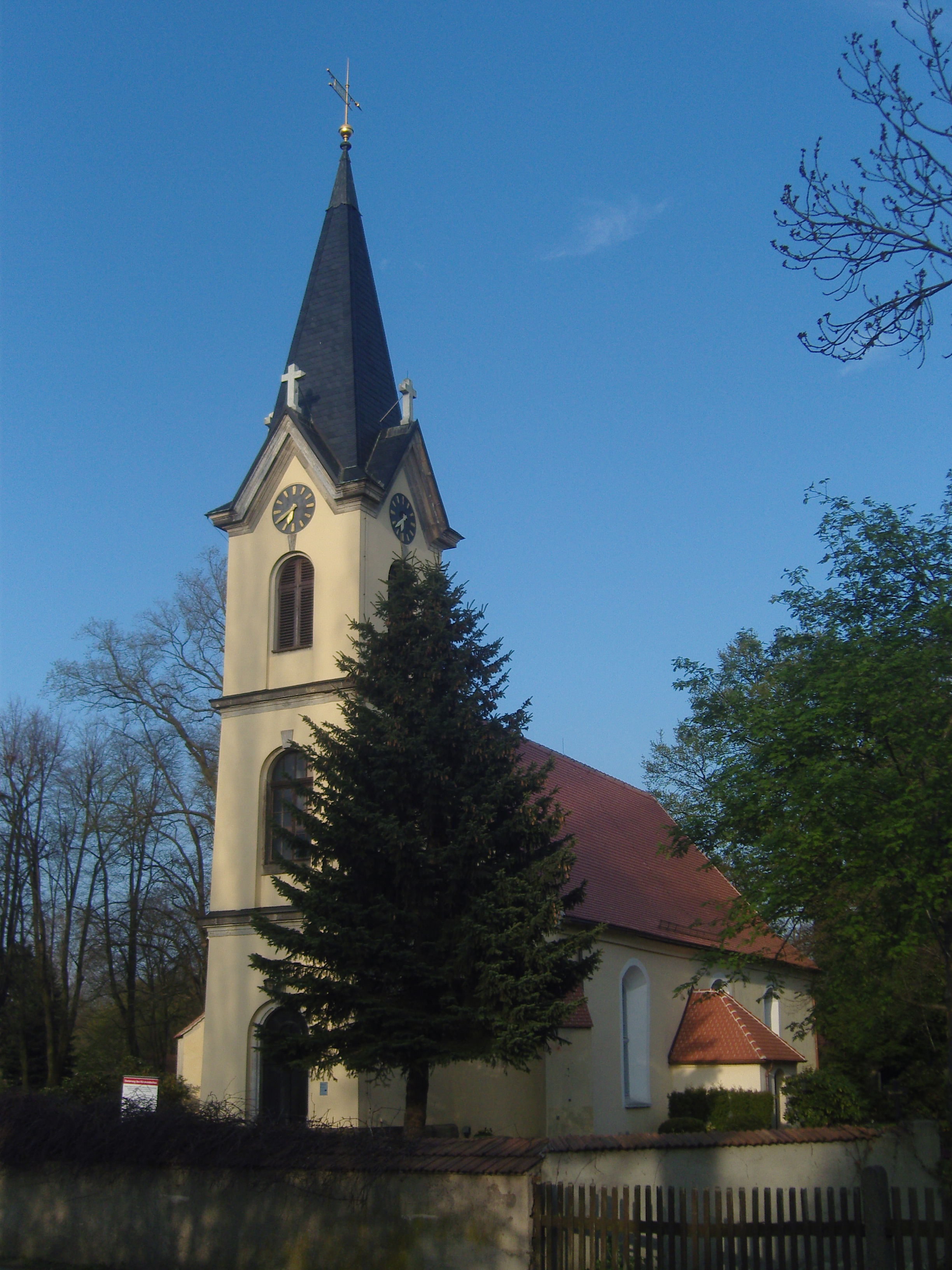 Kirche in Schwepnitz